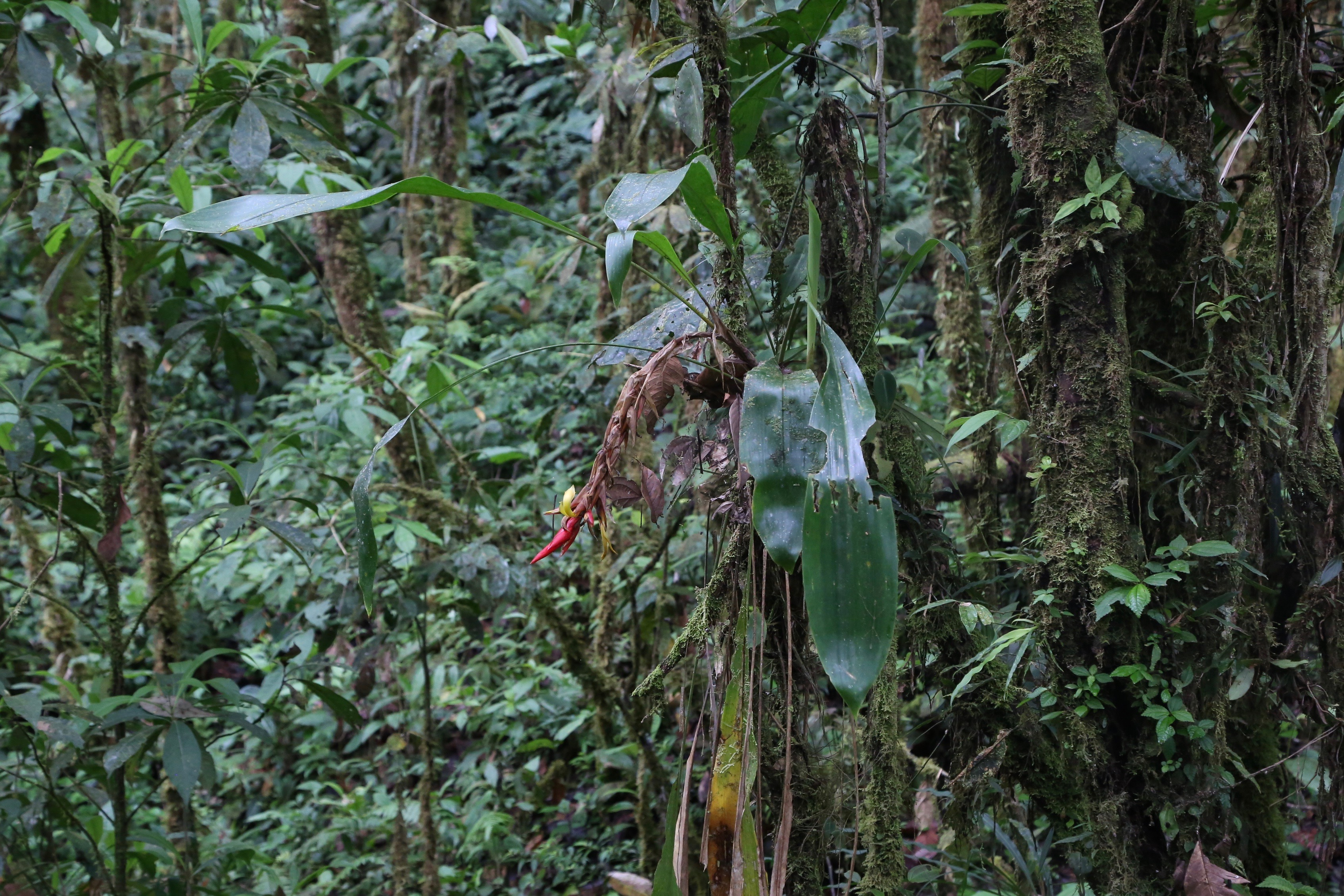 Ecuador, Pastaza, Mera, Río Alpayacu.